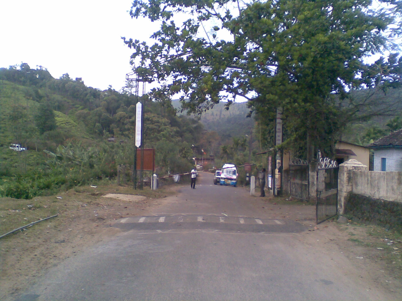 ഗവയിലേക്കു തുറക്കുന്ന വള്ളക്കടവിലെ വനം വകുപ്പ് ചെക്ക് പോസ്റ്റ്